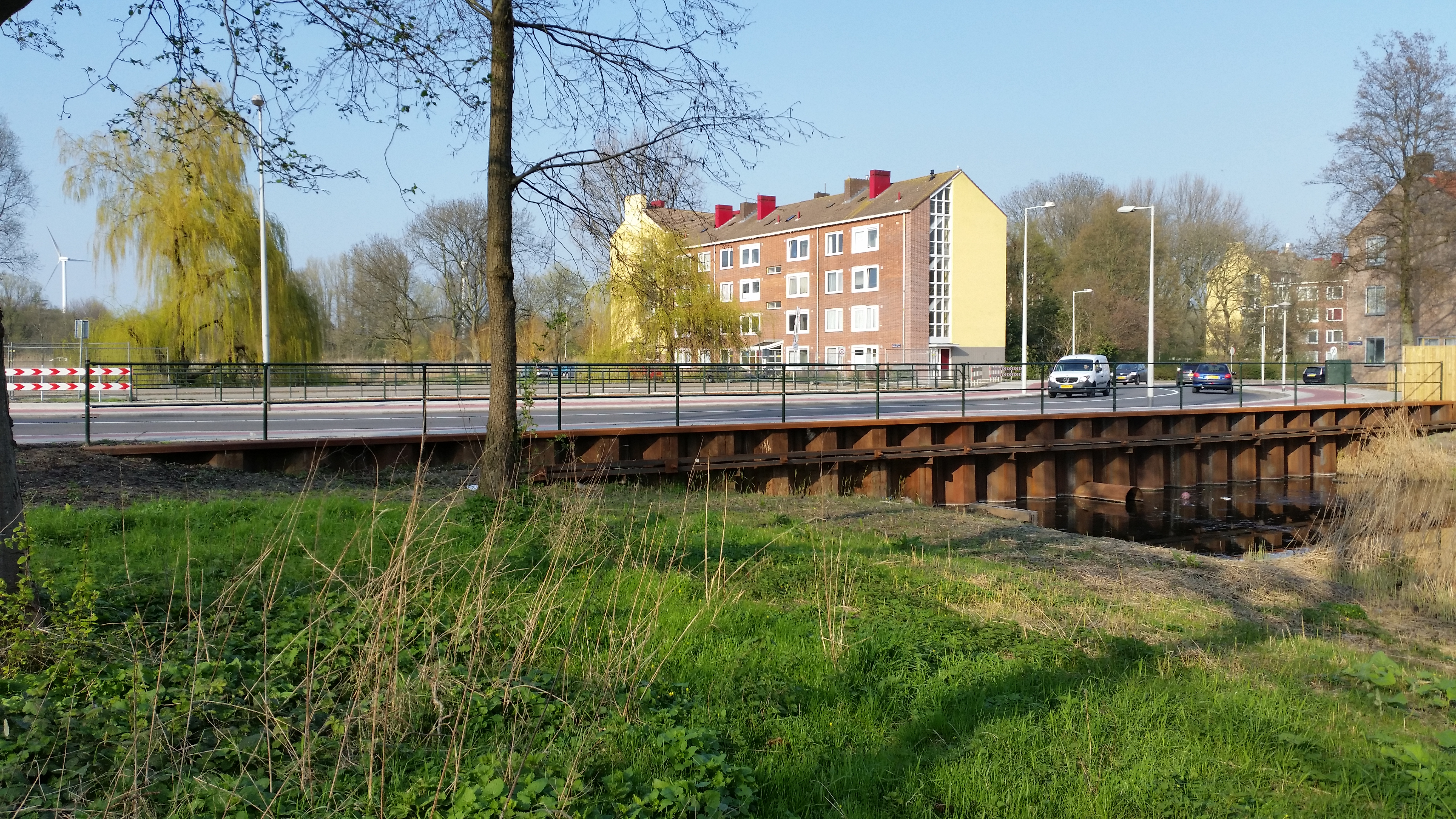 Nieuwe Brug 627 (in Amsterdam)